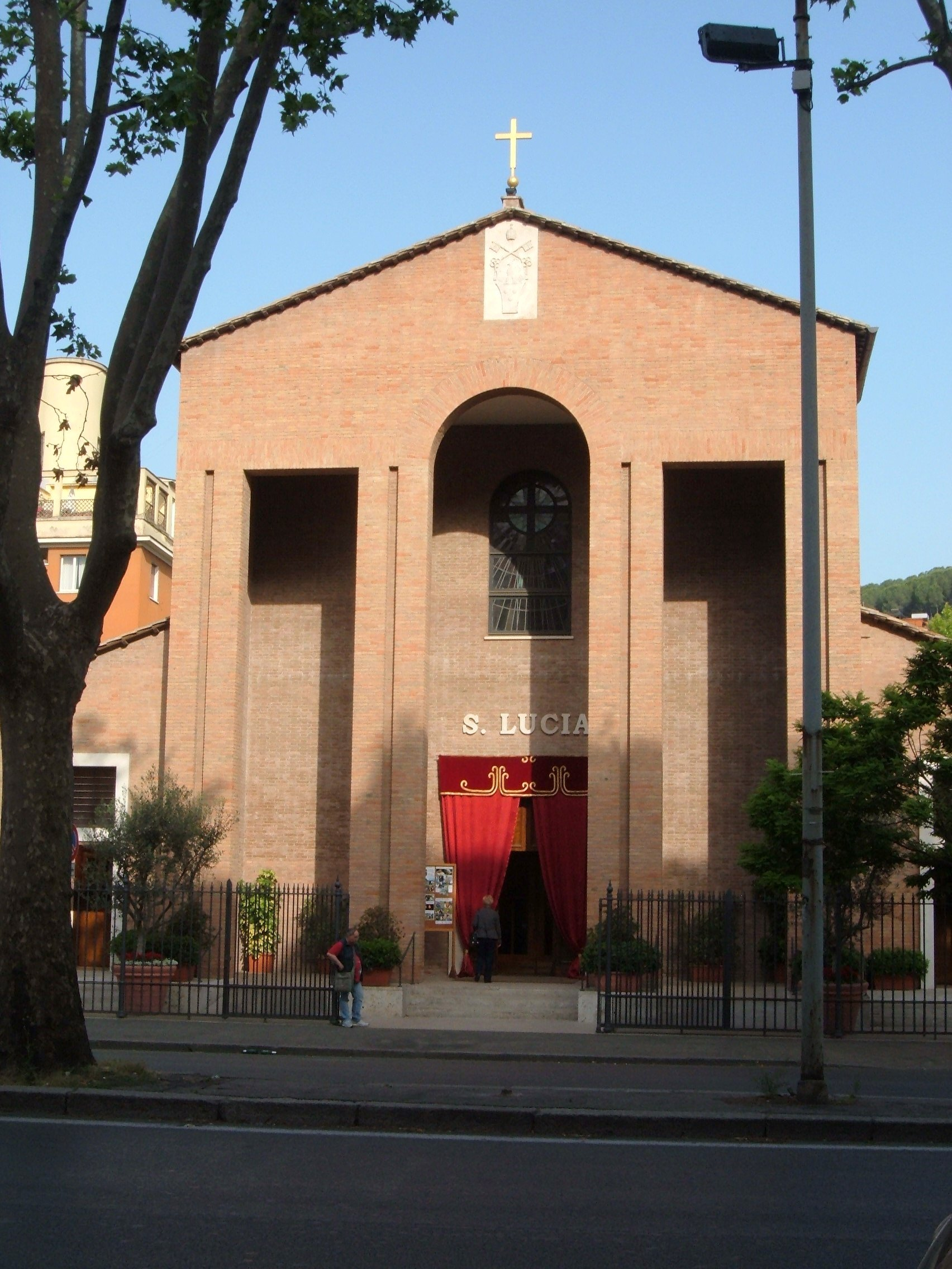 Chiesa di Santa Lucia, a Roma, nel quartiere della Vittoria.